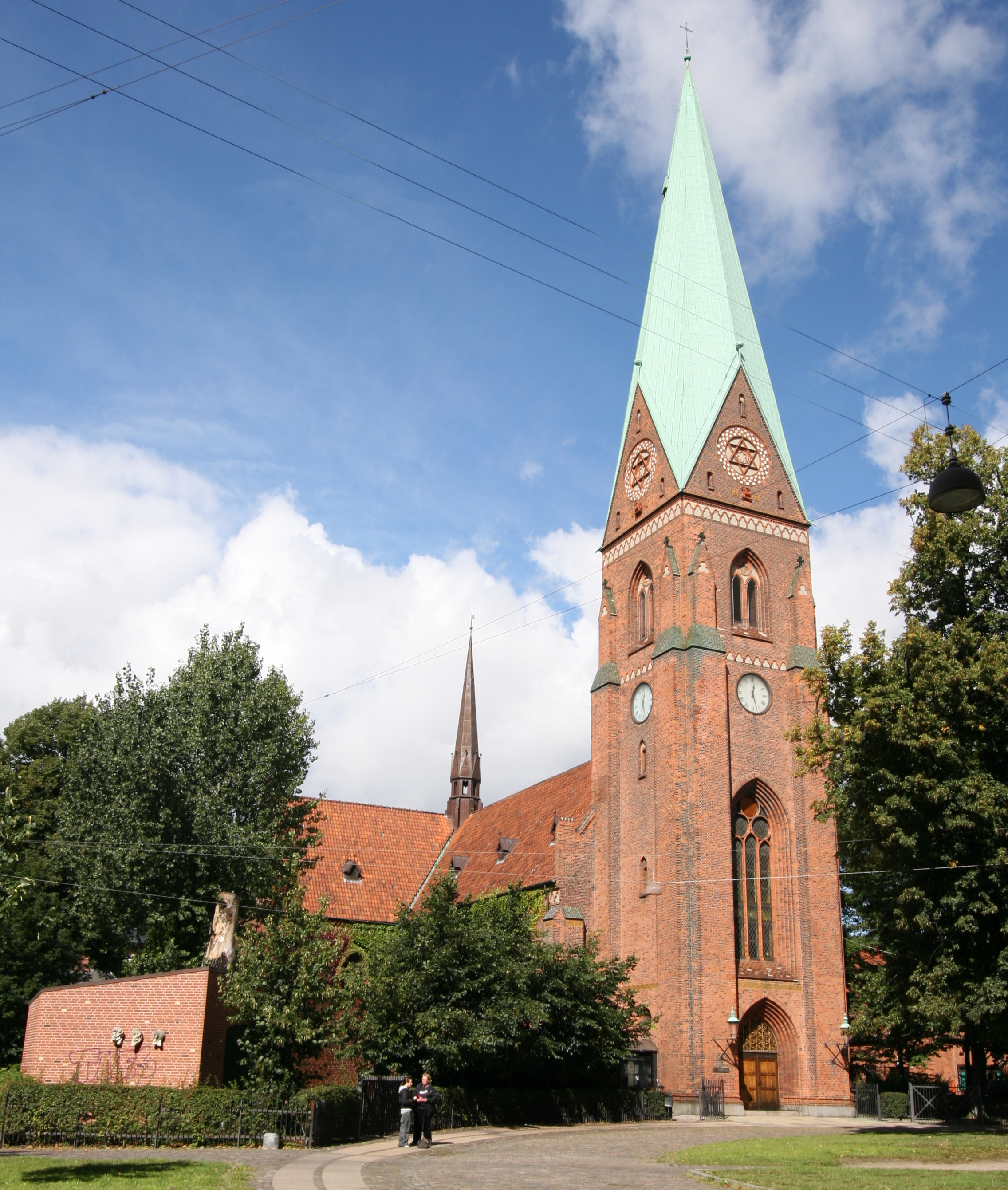 Hellig Kors Kirke, Copenhagen, Denmark. Hellig Kors Kirke